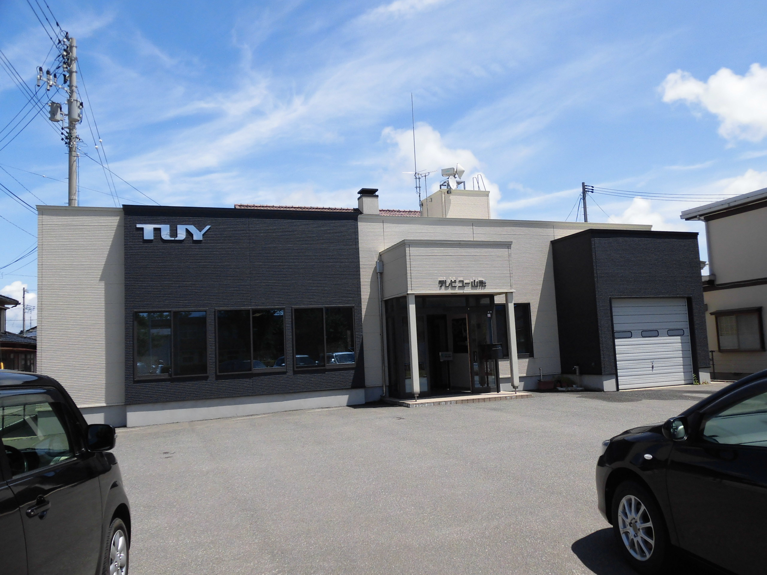 テレビユー山形本社兼庄内センター。酒田市入船町に所在。